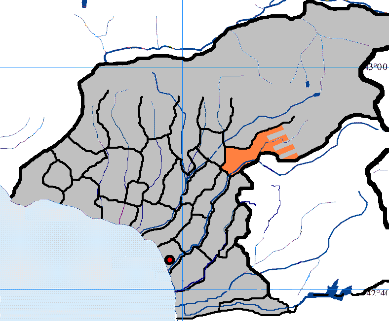 село Гуп в Очамчирском районе